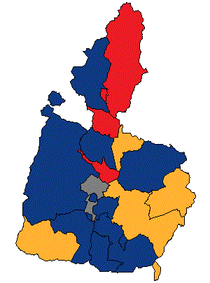 !Template:Llegenda}